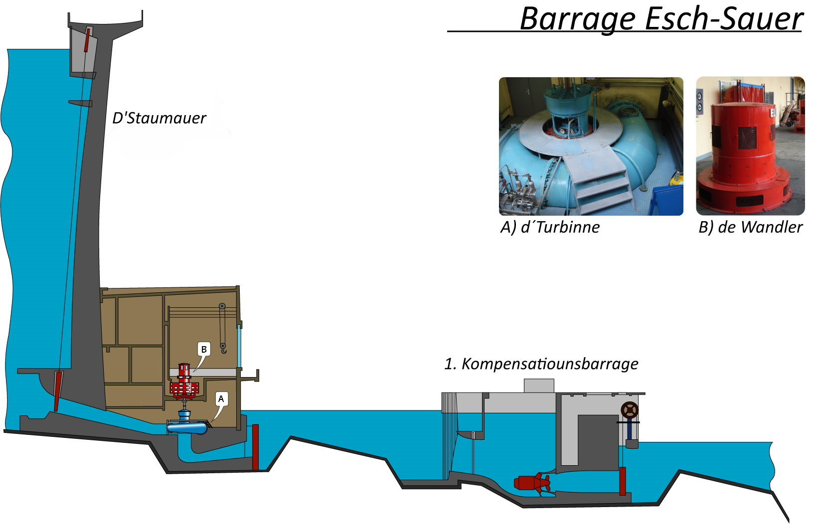 Dëst Bild weist e vereinfachte Queeschschnëtt duerch d'Staumauer an d'Pompelstatioun vum Barrage Esch-Sauer